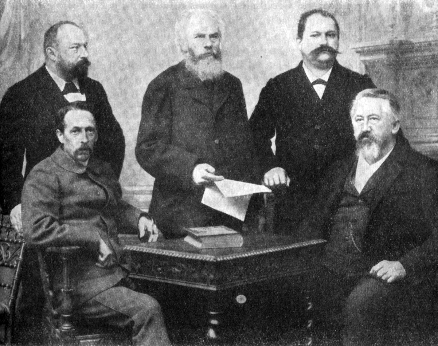 Das Schweizerische Arbeitersekretariat des Neuen Schweizerischen Arbeiterbundes. Von links nach rechts: August Merk (1888–1906 Adjunkt), Louis Héritier (Adjunkt), Herman Greulich (Sekretär 1887–1925), Gottfried Reimann (Adjunkt), Rudolf Morf (1889–1924 Adjunkt)